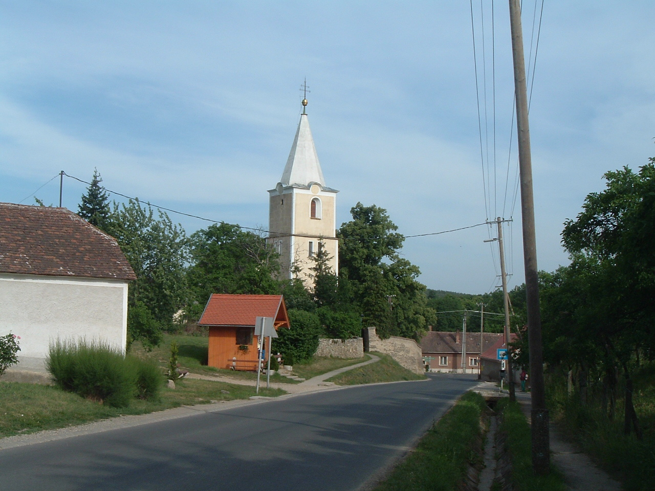 Kőszegszerdahely, Hungary